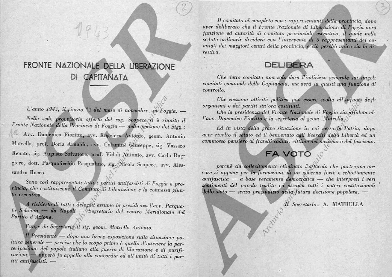 Verbale della riunione costitutiva del CLN di Foggia, 22 novembre 1943 (Archivio Storico del Senato della Repubblica)